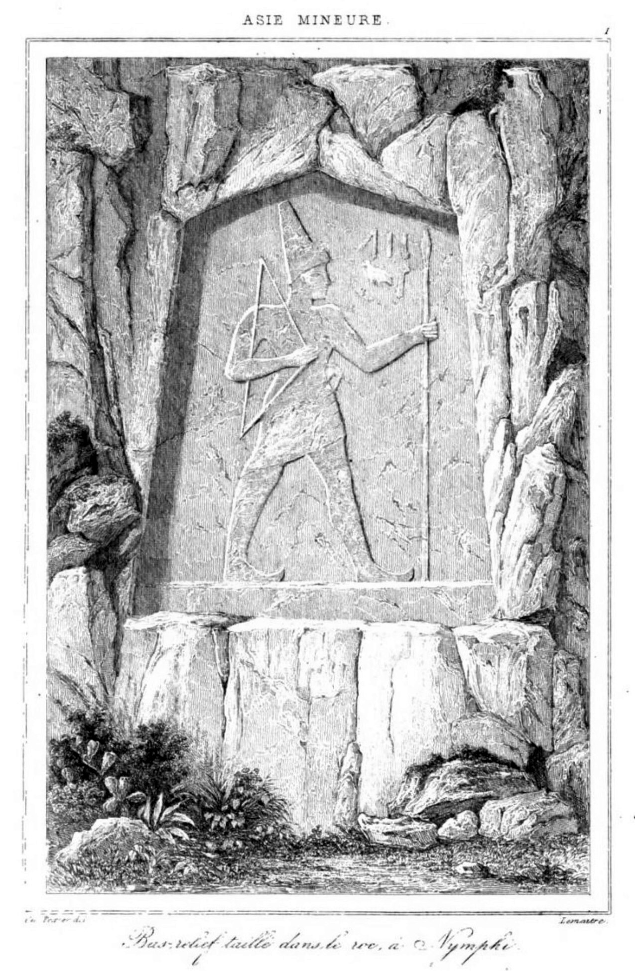 Hethitisches Relief von Karabel, Westtürkei, Zeichnung von Charles Texier